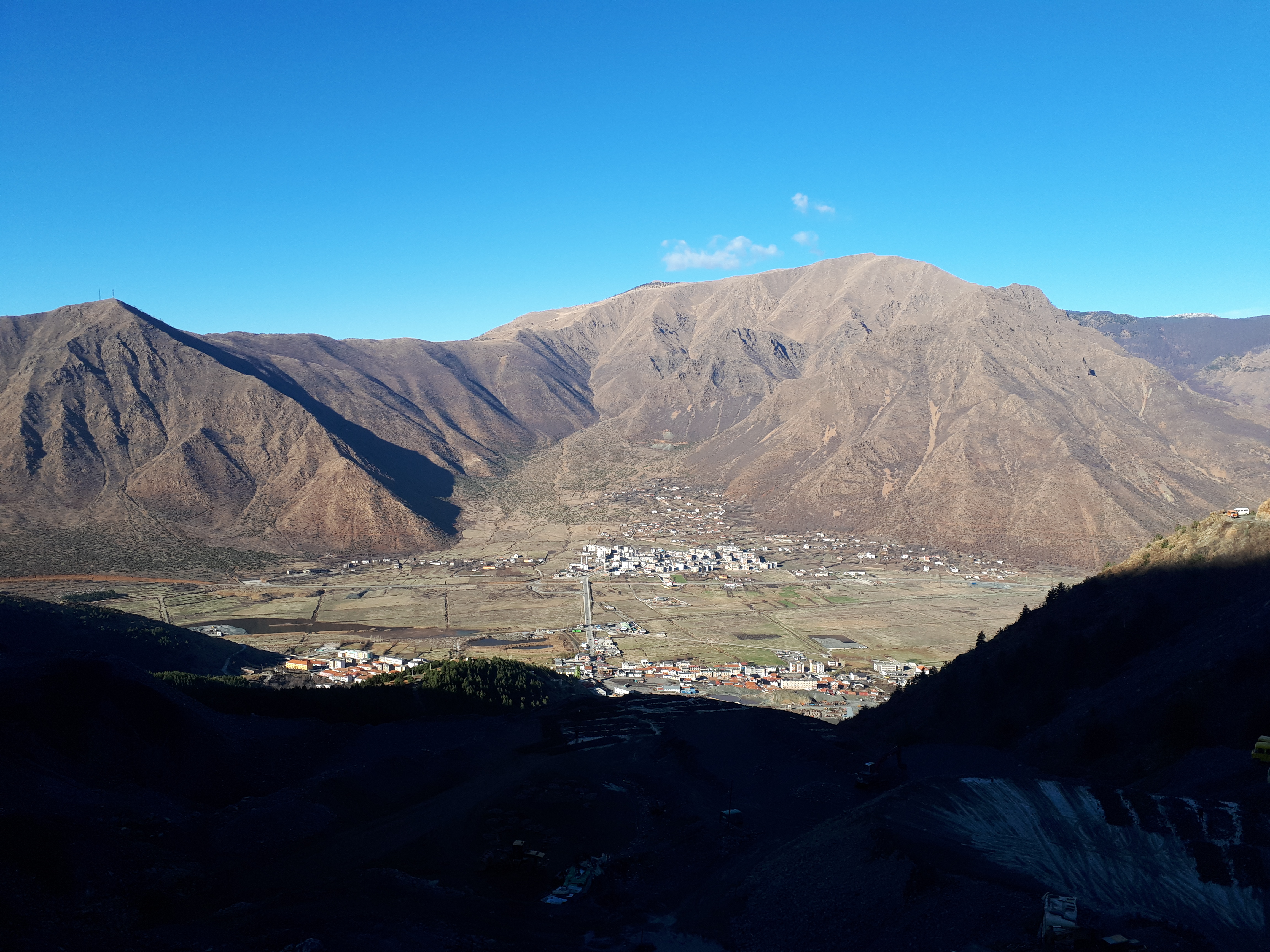 M. Gropa-Bize-Martanesh, Tirane, Mat, Buiqize